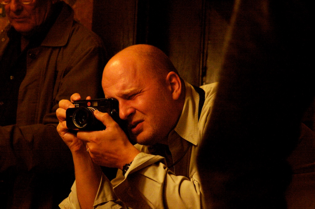 Märten Kross, Eesti fotograafMärten Kross, Estonian photographer